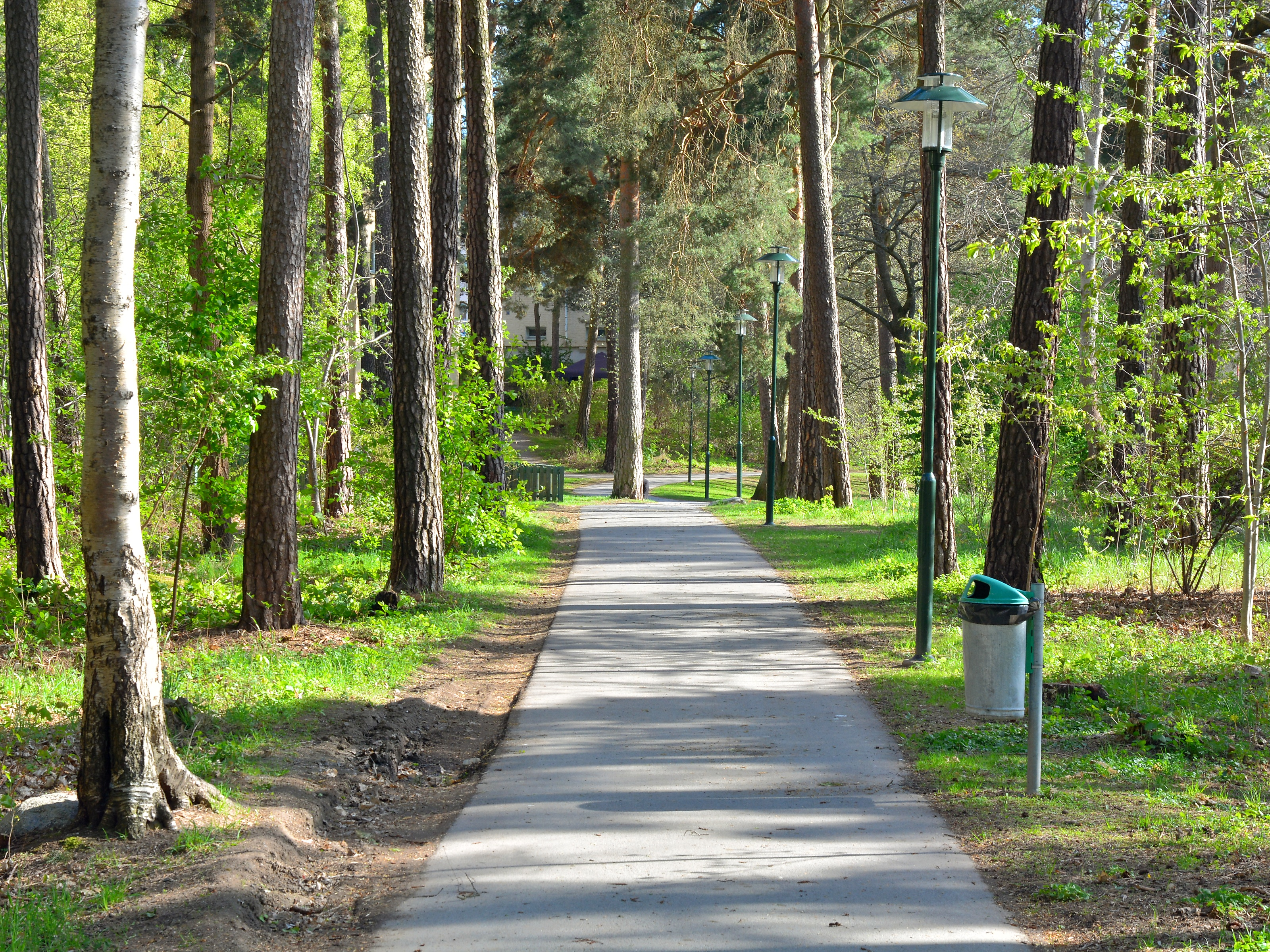 Vättersparken i Årsta i södra Stockholm.